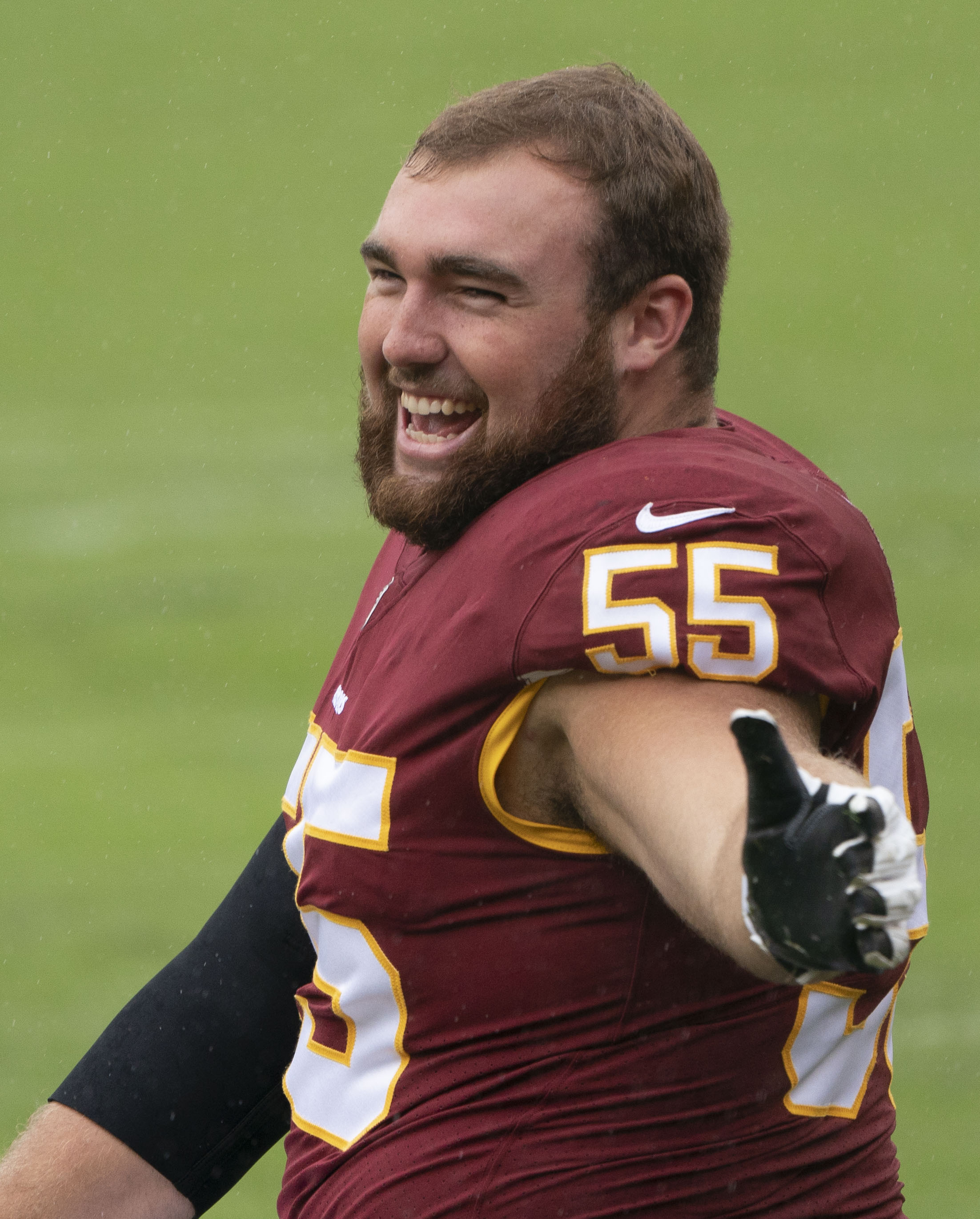 Packers at Redskins 09/23/18